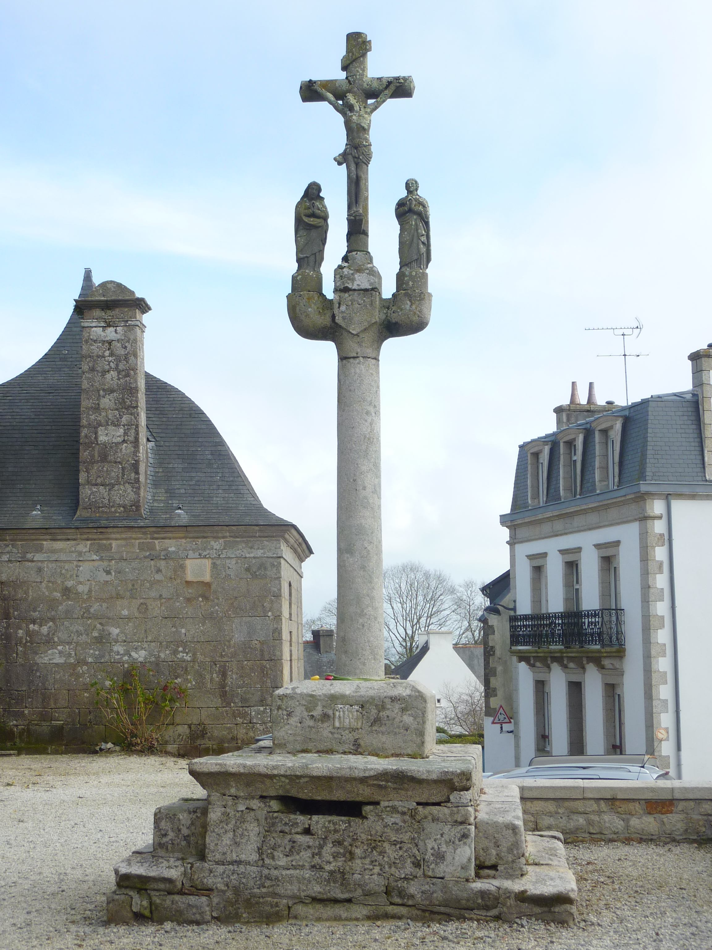 Fouesnant : le calvaire près de l'église Saint-Pierre-et-Saint-Paul avec les statues de la Vierge et de saint Jean